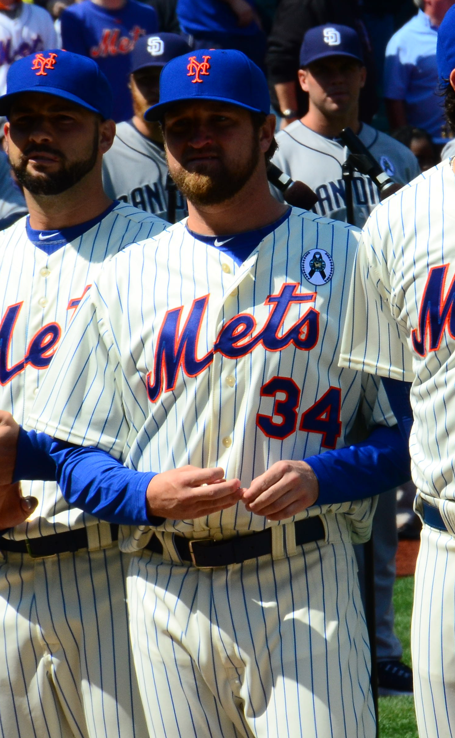 Brandon Lyon